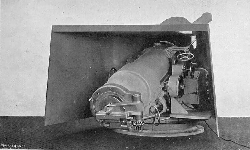 cannone EOC 8 in Pattern W